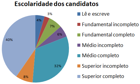 Gráfico mostrando o índice de escolaridade dos candidatos (prefeito+vereador) da eleição municipal de Curitiba em 2012.